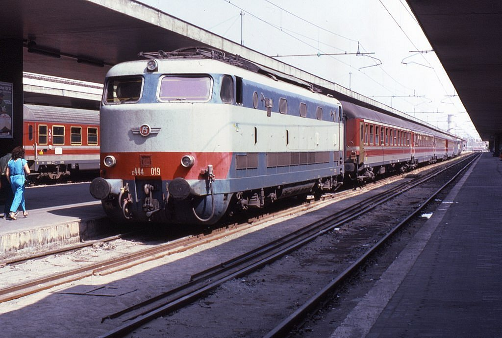 Locomotiva elettrica E.444.019 delle Ferrovie dello Stato in sosta a Roma Termini.